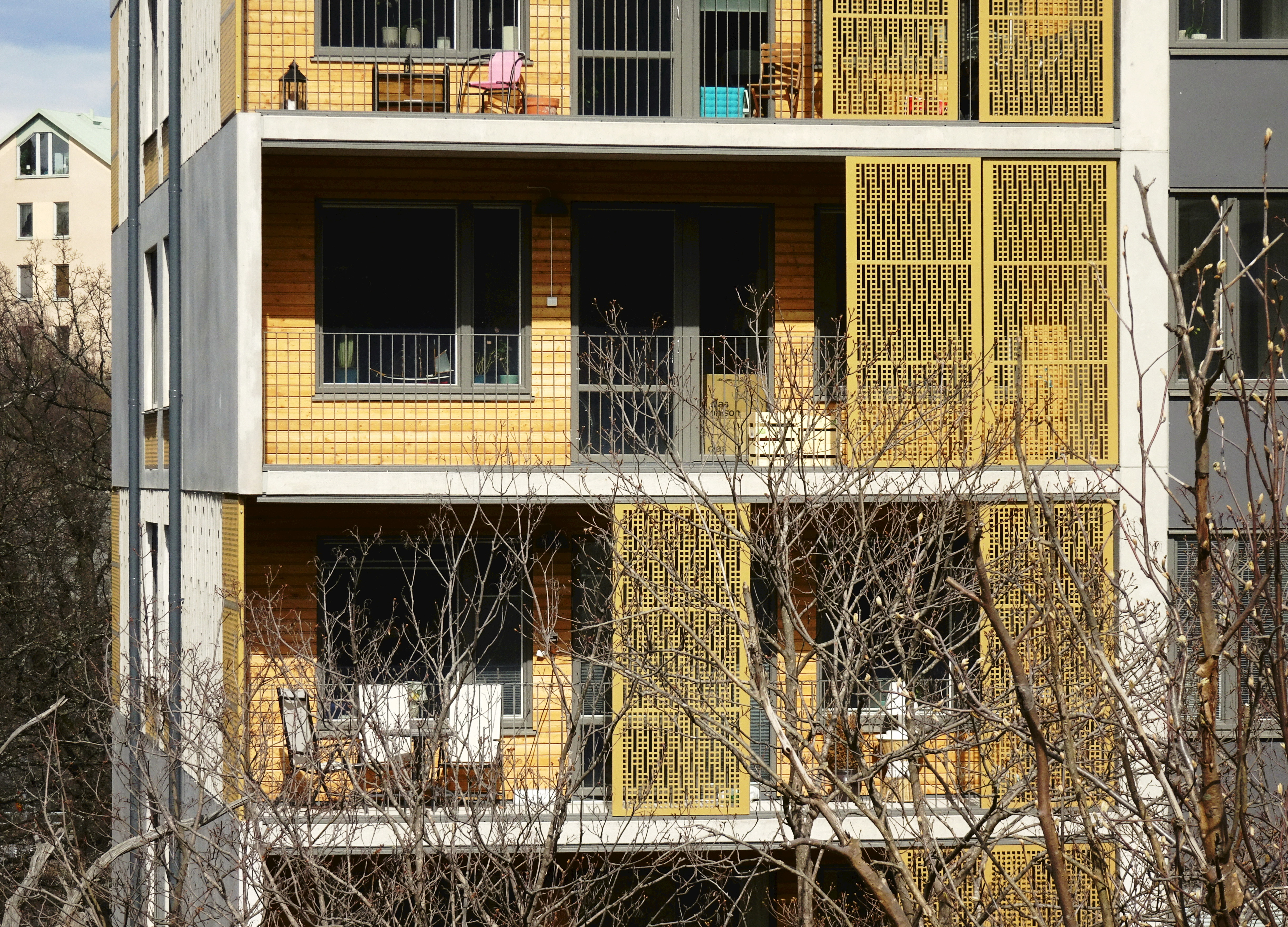 Bostadshuset "Riggen" i Gröndal, Arkitekterna Krook & Tjäder